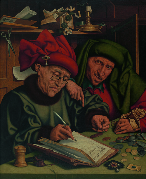 Marinus van Reymersweale, De belastingontvangers, 1520-1530, olieverf op gemaroufleerd paneel, 93,3 x 76 cm.